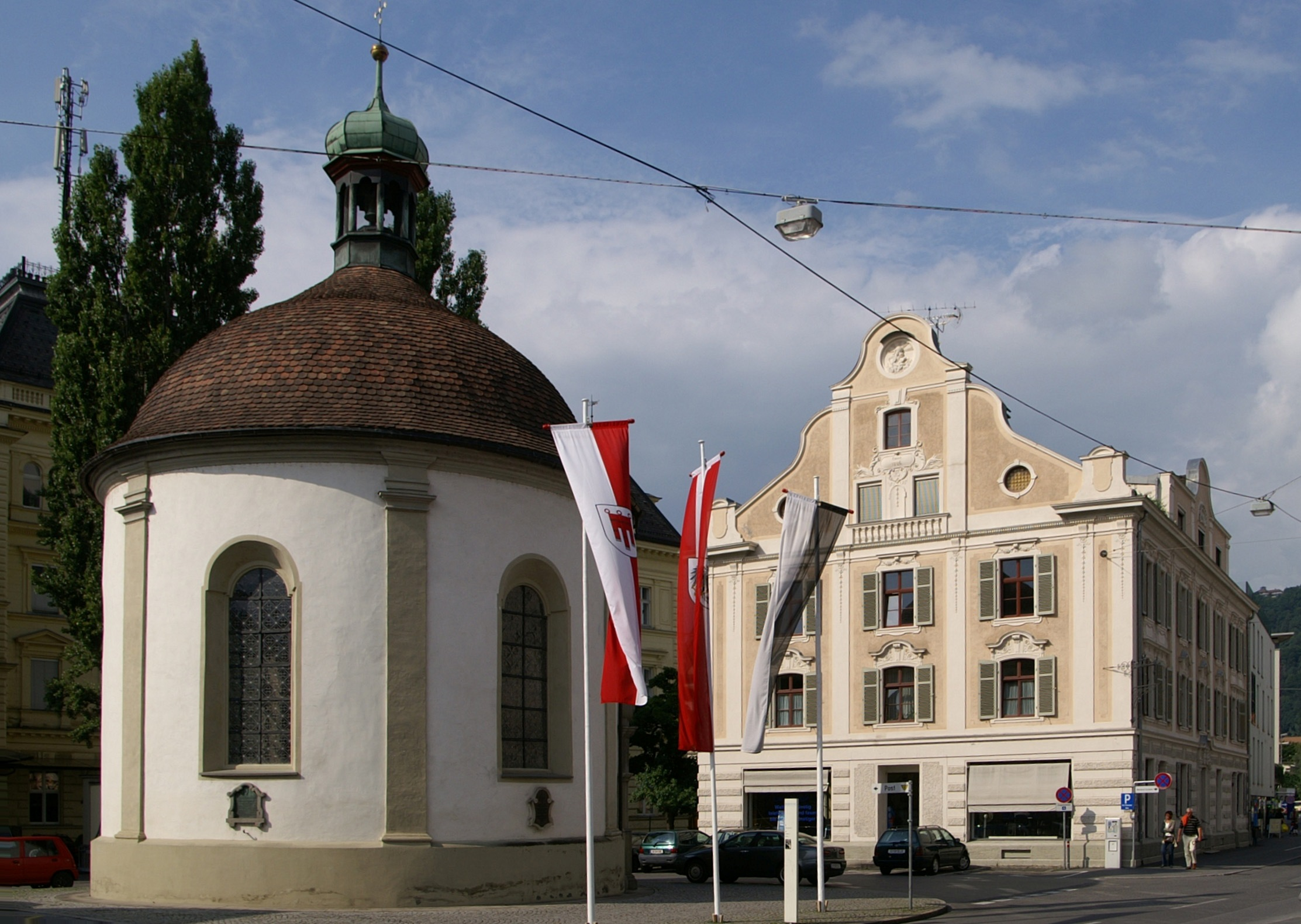 Die Kapelle des hl. Johannes Nepomuk wurde 1757 von Johann Michael Beer von Bildstein erbaut. In Bregenz, Innenstadt